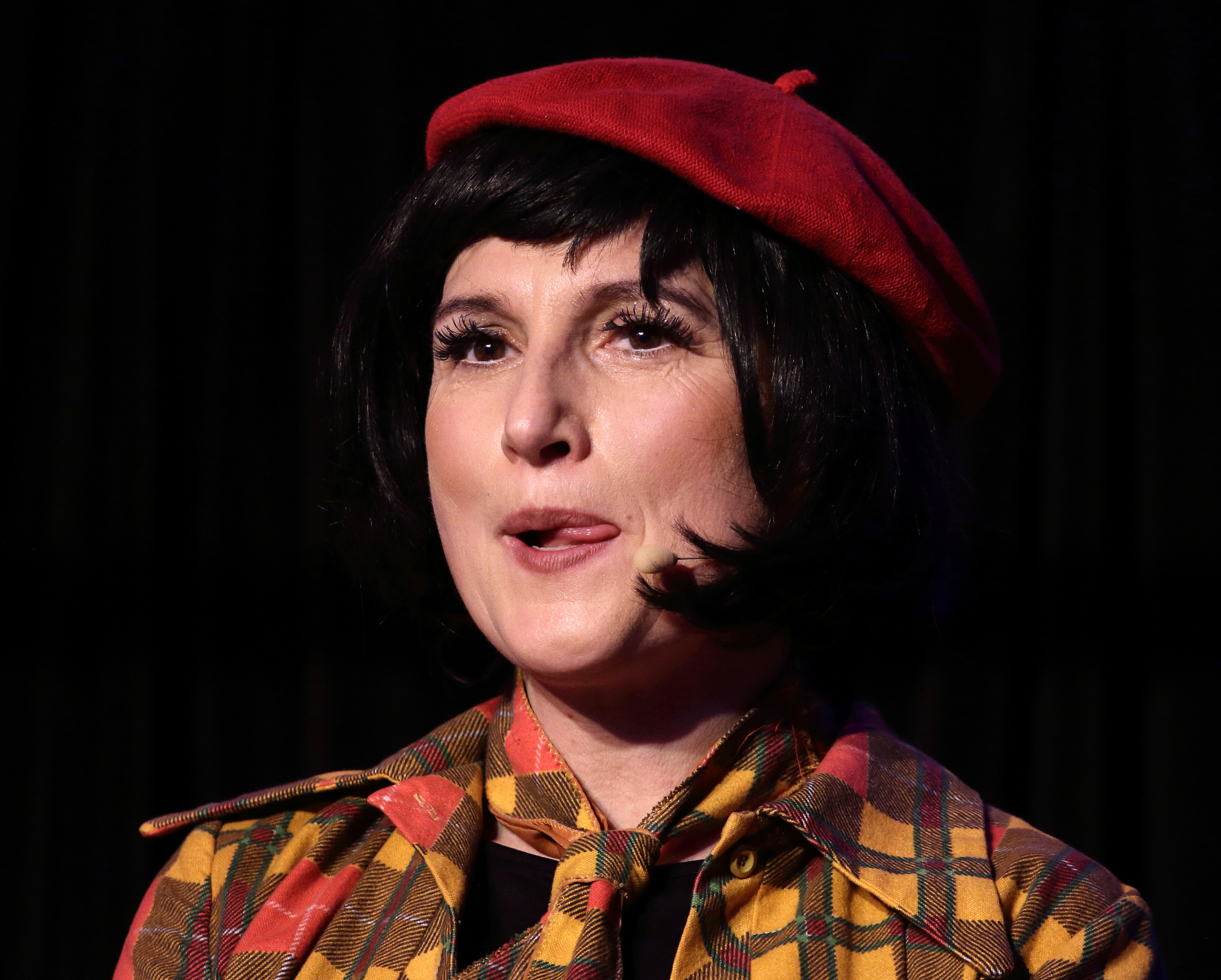 Mademoiselle Mirabelle bei einem Auftritt im Naturtheater Heidenheim am 19. Februar 2016 (Reihe Kultur im Café).